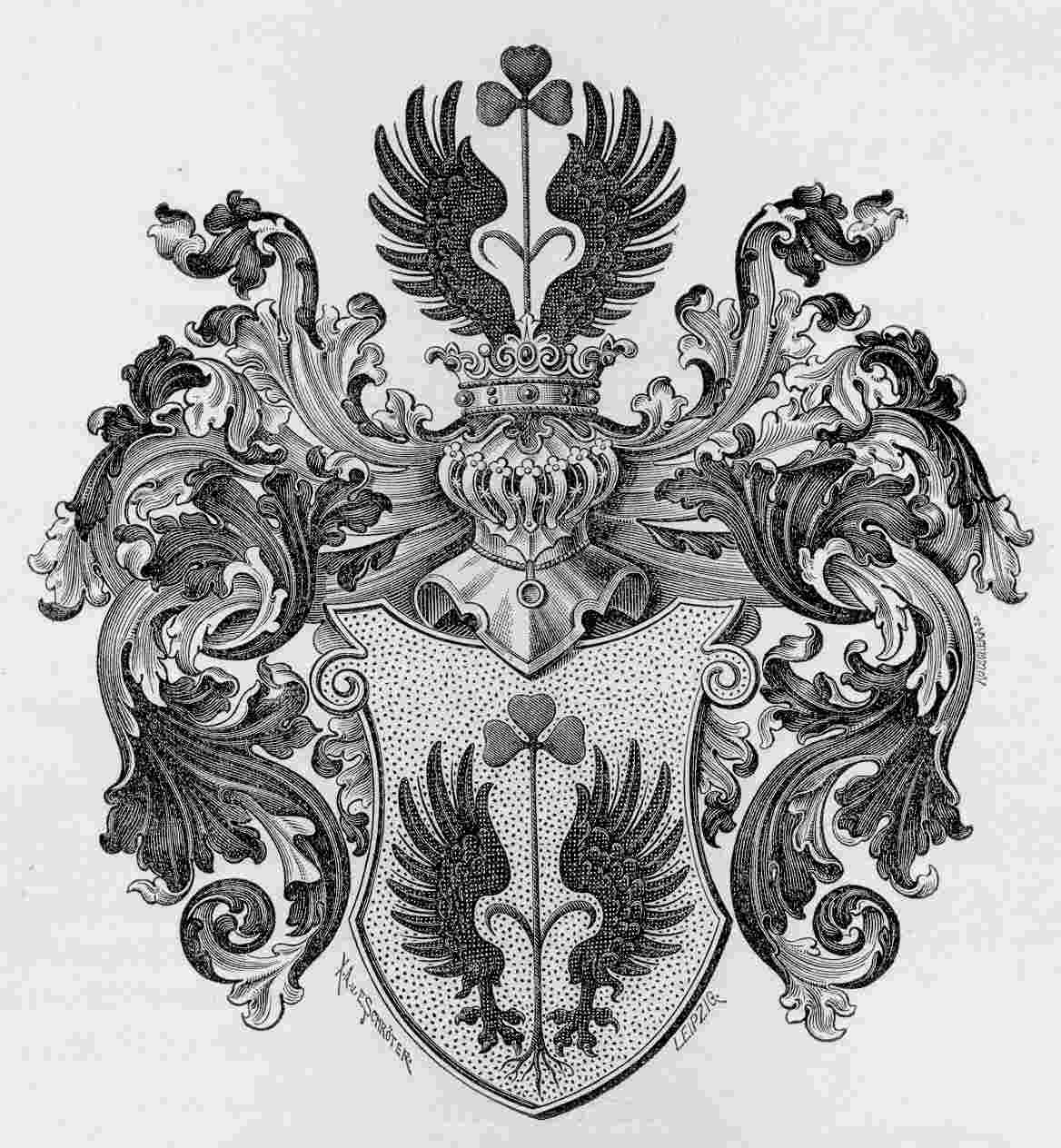 Wappen nach dem Vorbild im Adelsbrief der Brüder Caspar und Michael Tryller (Triller)